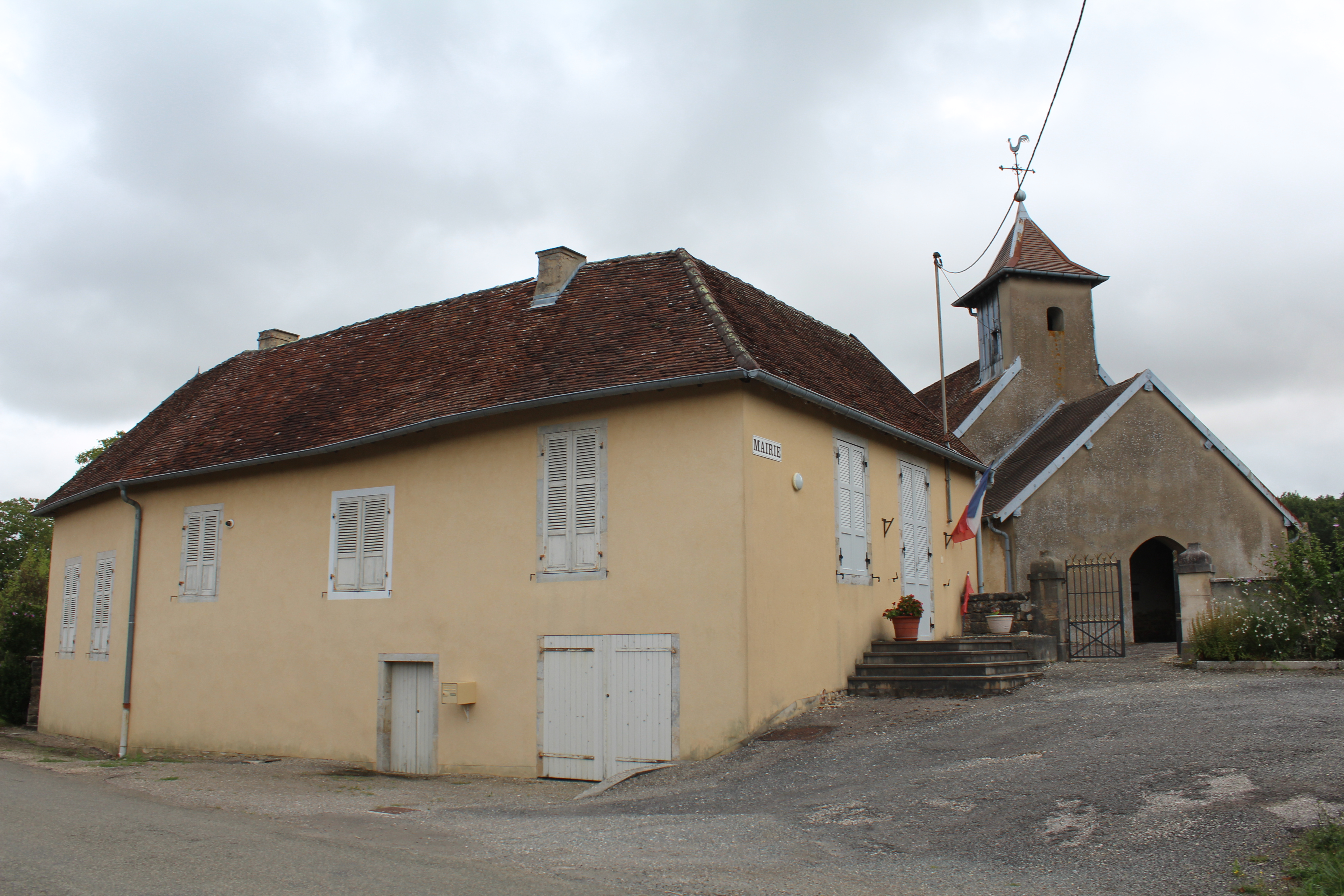 Mairie d'Abergement-le-Grand.